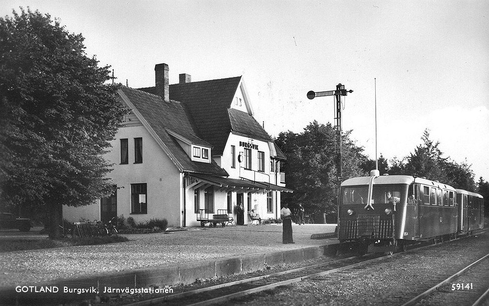 Rälsbusståg vid Burgviks station någon gång mellan 1945 och 1948.